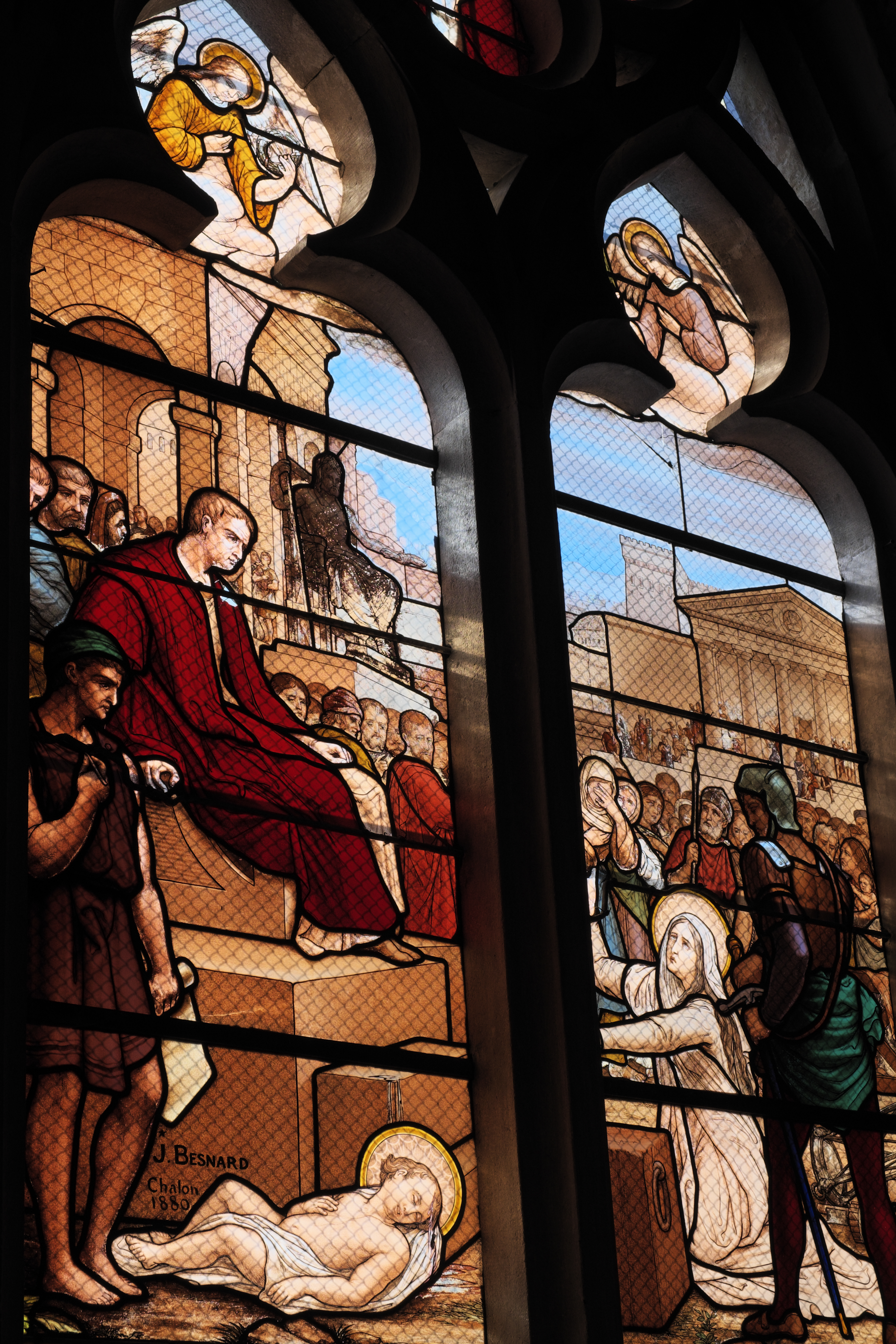 Katholische Kirche Saint-Cyr-et-Sainte-Julitte in Volnay im Département Côte-d’Or (Bourgogne-Franche-Comté/Frankreich), Bleiglasfenster mit der Signatur: J. Besnard à Chalon 1880; Darstellung: Quiricus und Julitta (Ausschnitt)